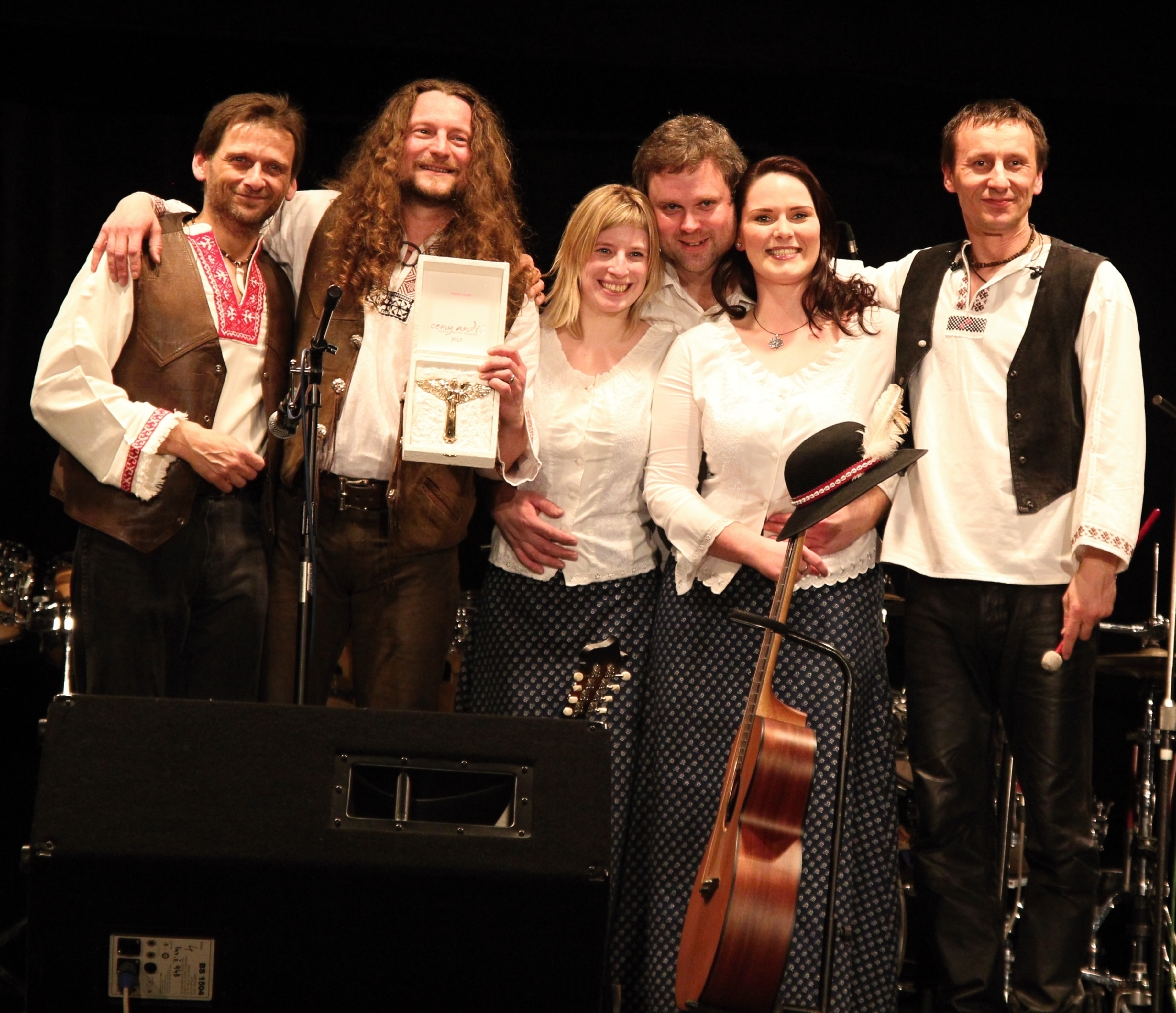 Tomáš Kočko & ORCHESTR with Anděl Award 2012